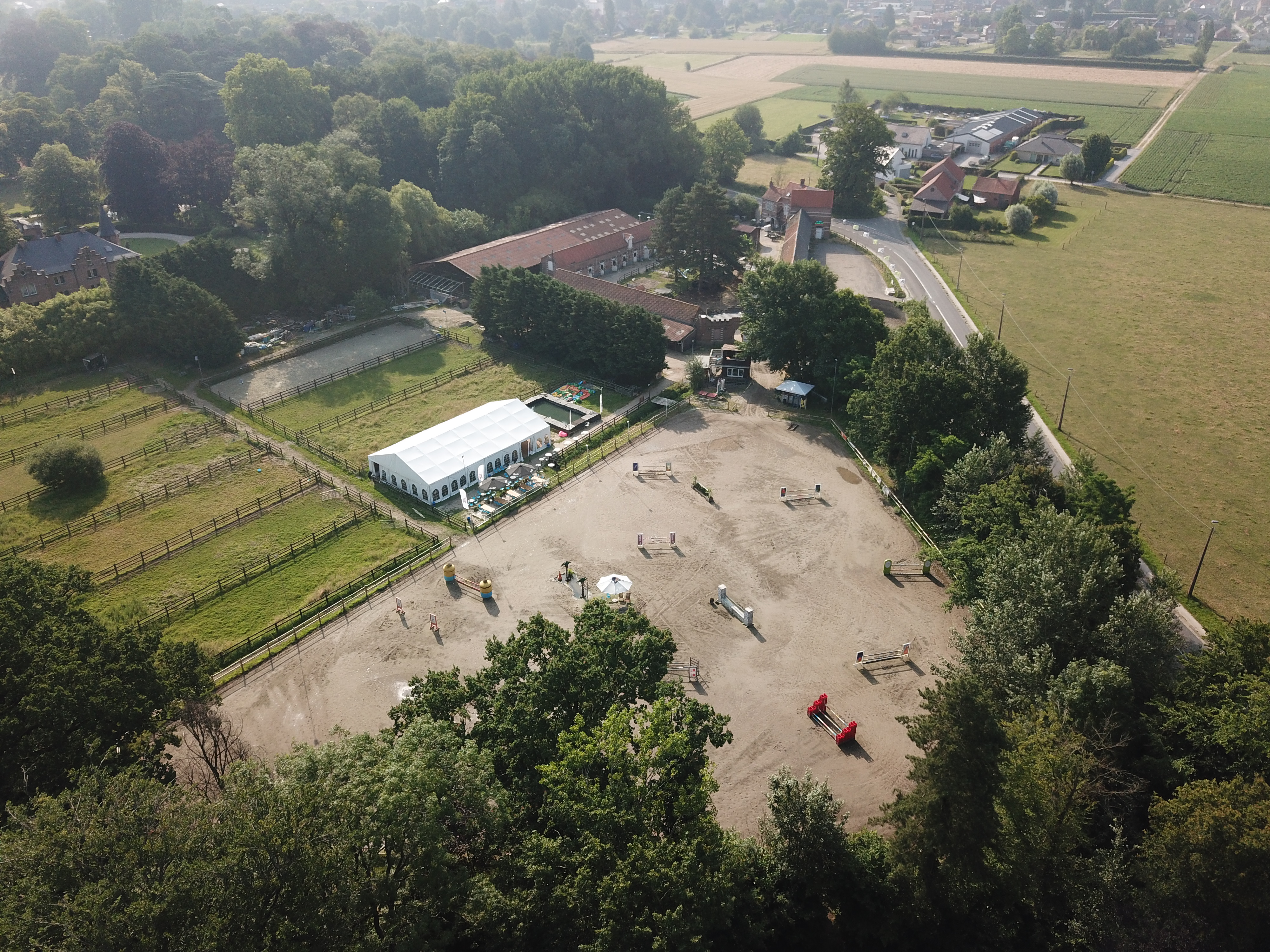 Zicht op de manege met buitenpiste, binnenpiste, weides, binnenplein en stallingen